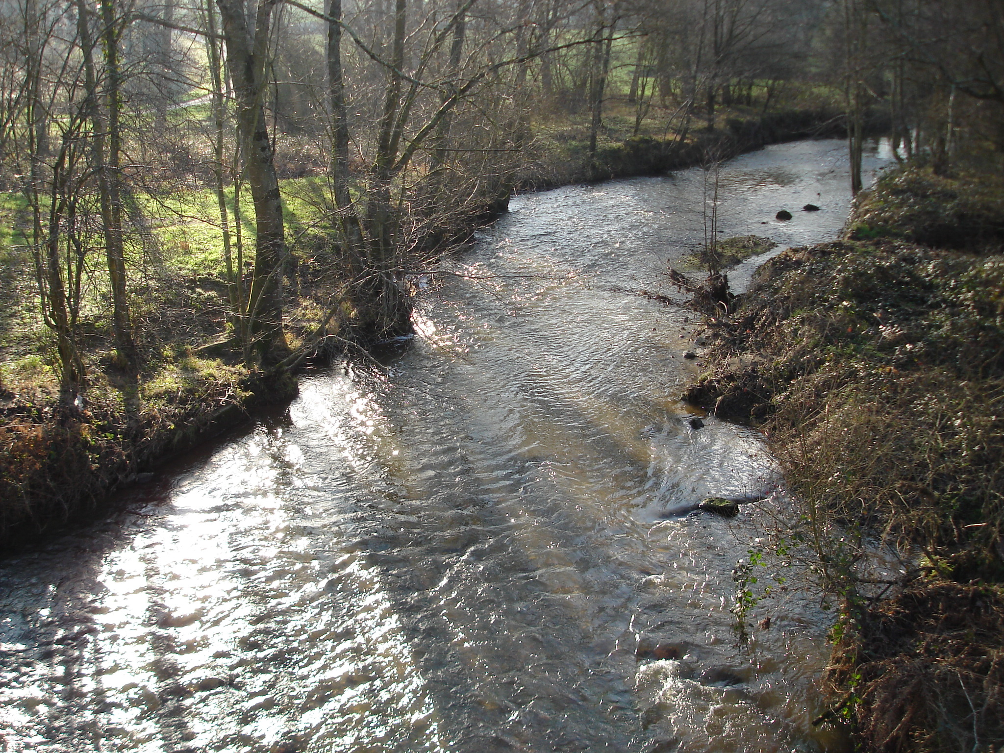 La rivière Indre, en direction de Sainte-Sévère-sur-Indre, à Pouligny-Saint-Martin (36).